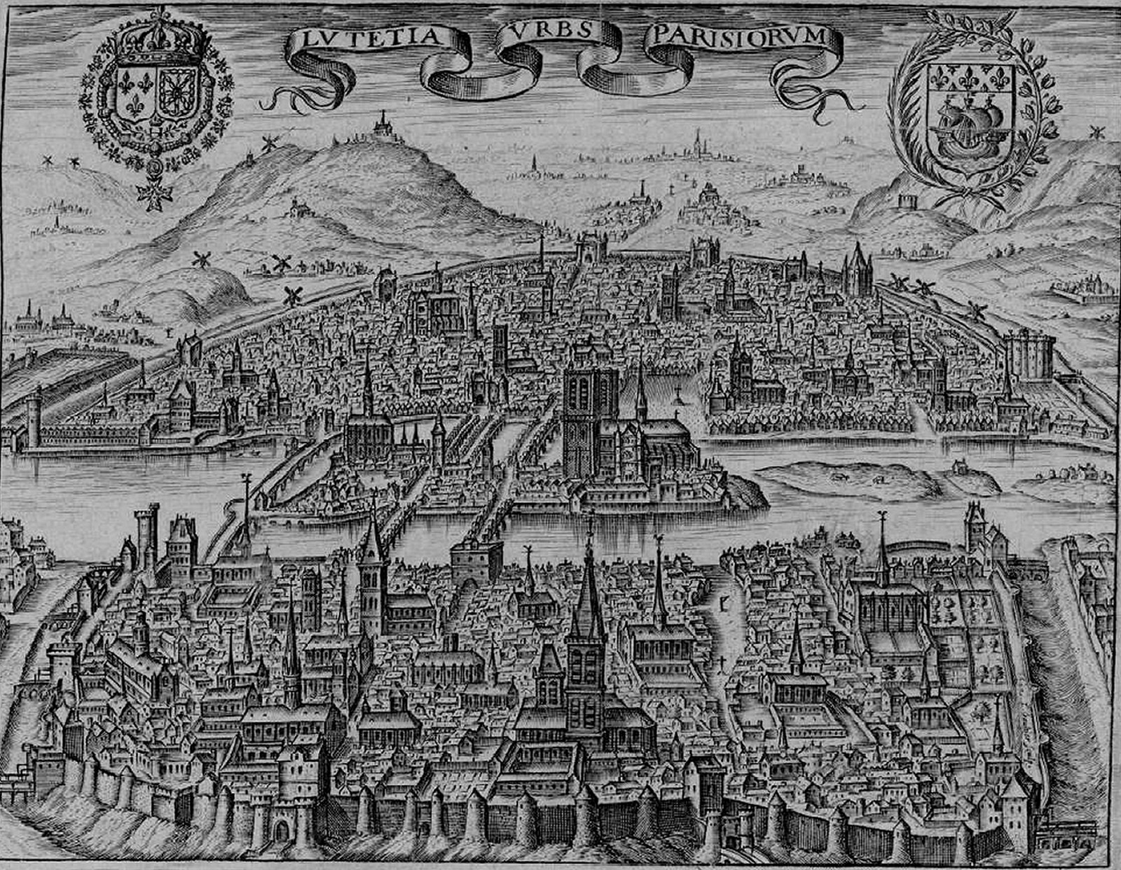 Vue de Paris vers 1600. Au premier plan, rive gauche, enceinte de Philippe Auguste. Au nord de la Seine, rive droite, enceinte de Charles V.